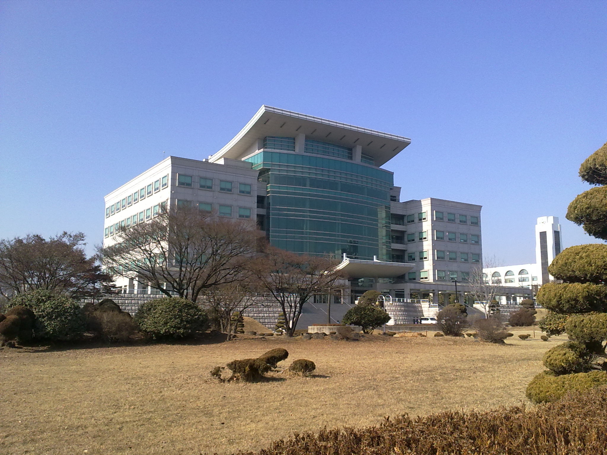 인하대학교 정석학술정보관